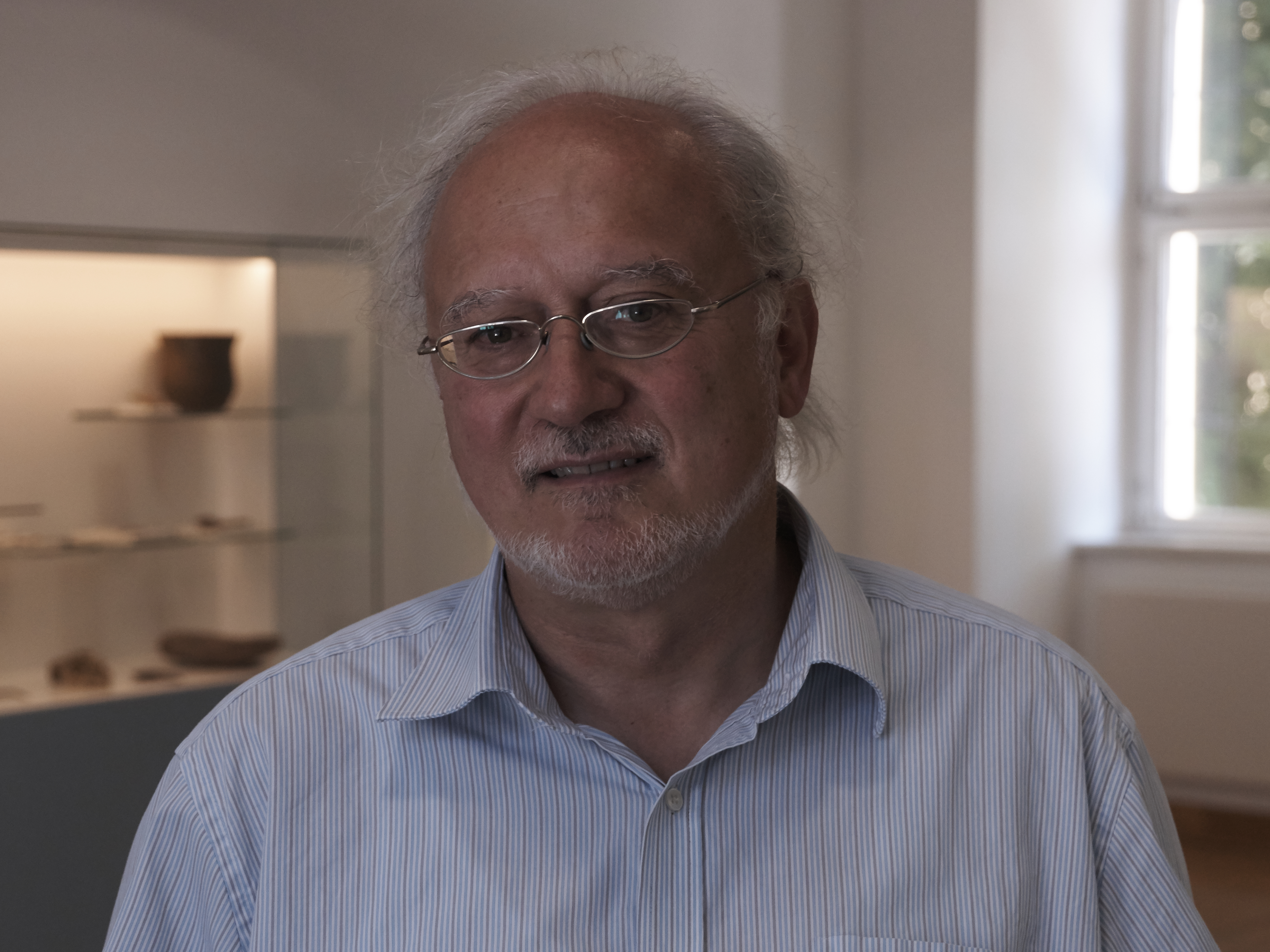 Thomas Heiler, Leiter des Kulturamts und des Stadtarchivs in Fulda, im Vondermuseum.